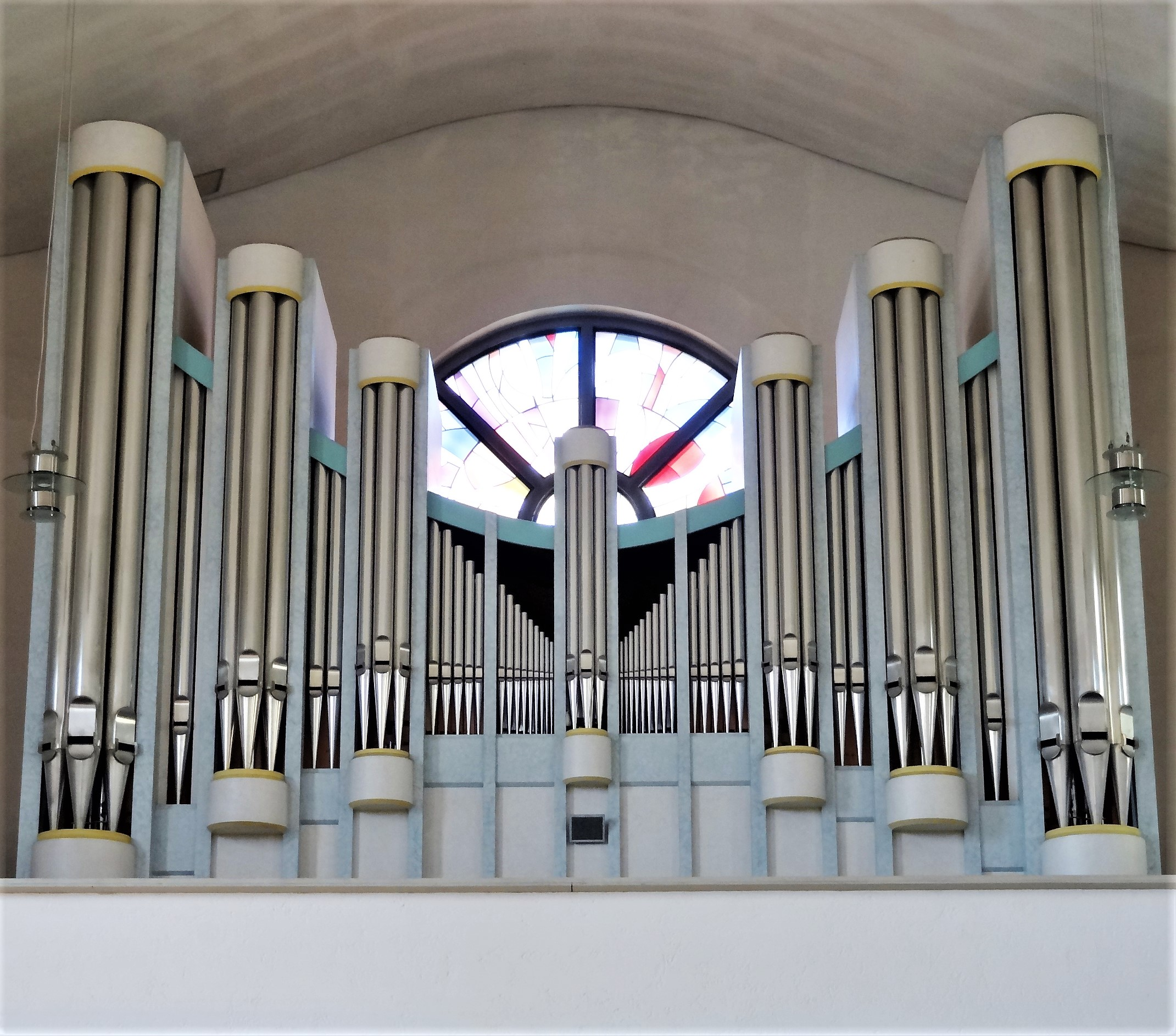 Pfarrkirche St. Wolfgang in Landshut - Orgel (Georg Jann, 1995)